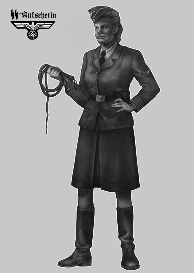 SS-Aufseherin: Female Camp Guards